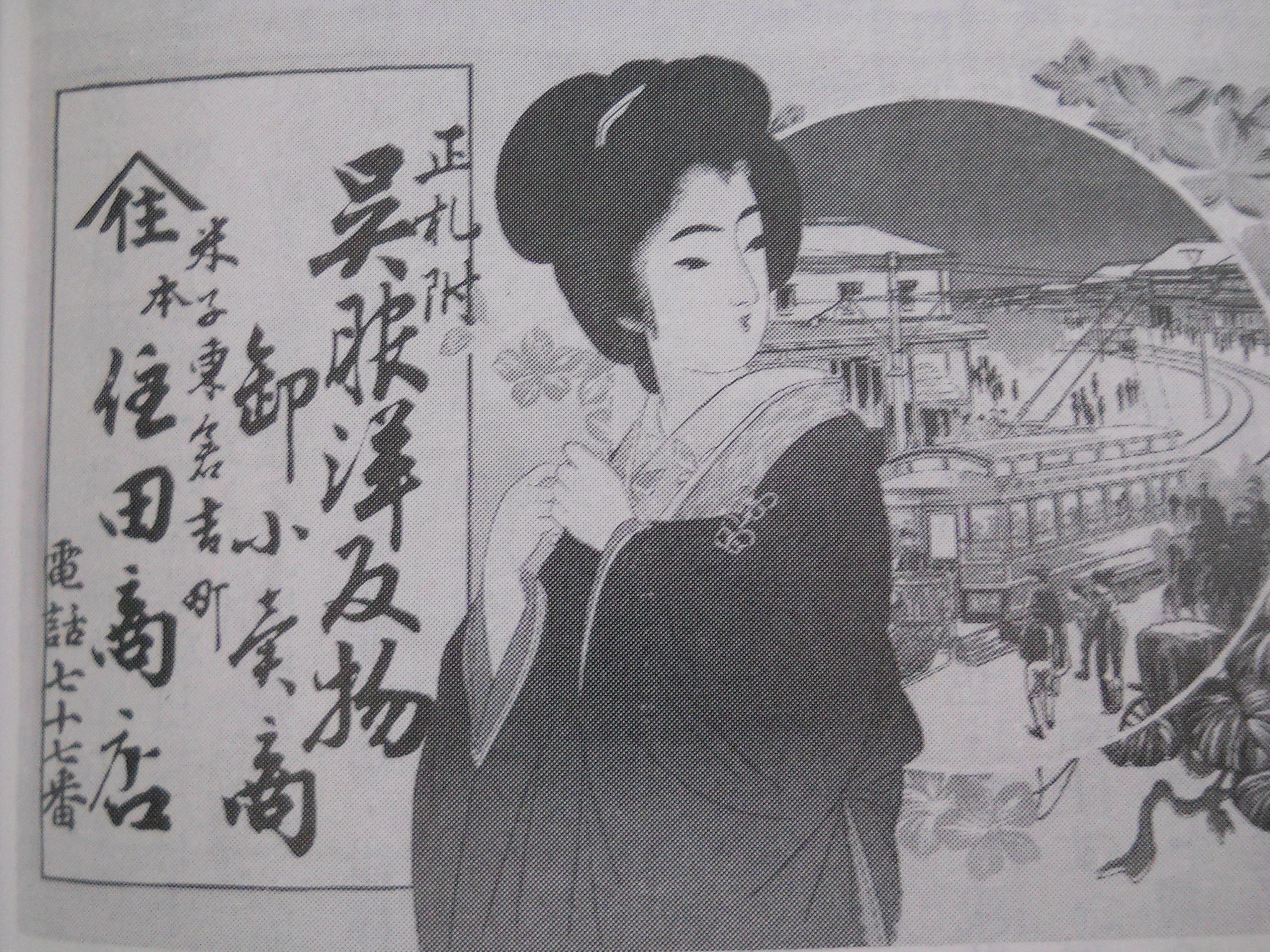 Sumida Store